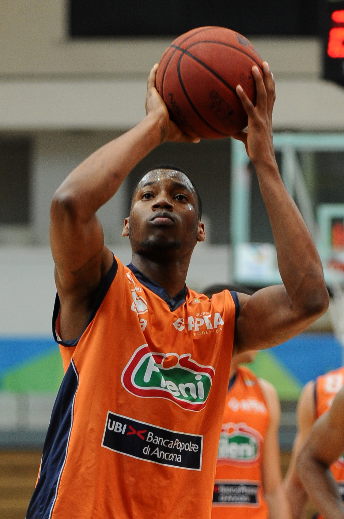 Eric Griffin con la maglia dell'Aurora Basket Jesi al PalaTrento.